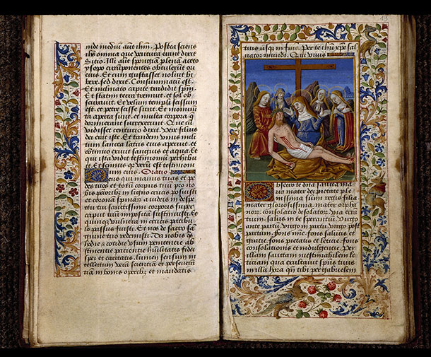 Heures de Jean Charpentier - 018v-019 Déploration (double page)